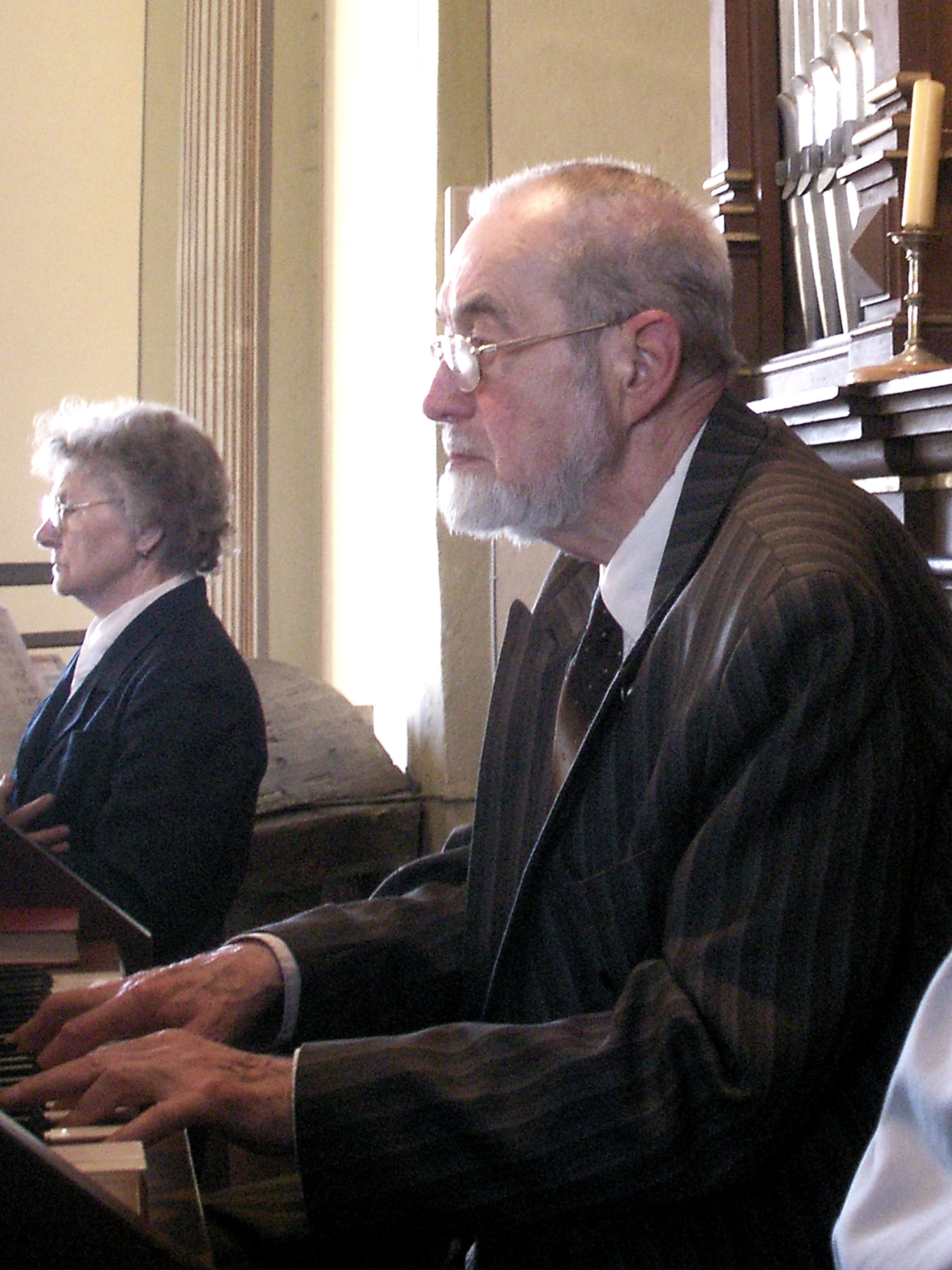 Jiri Strejc